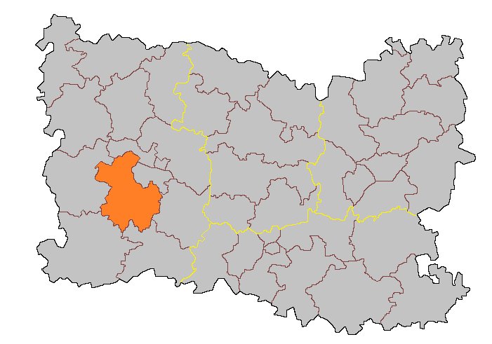 Кантон Онёй на карте департамента Уаза